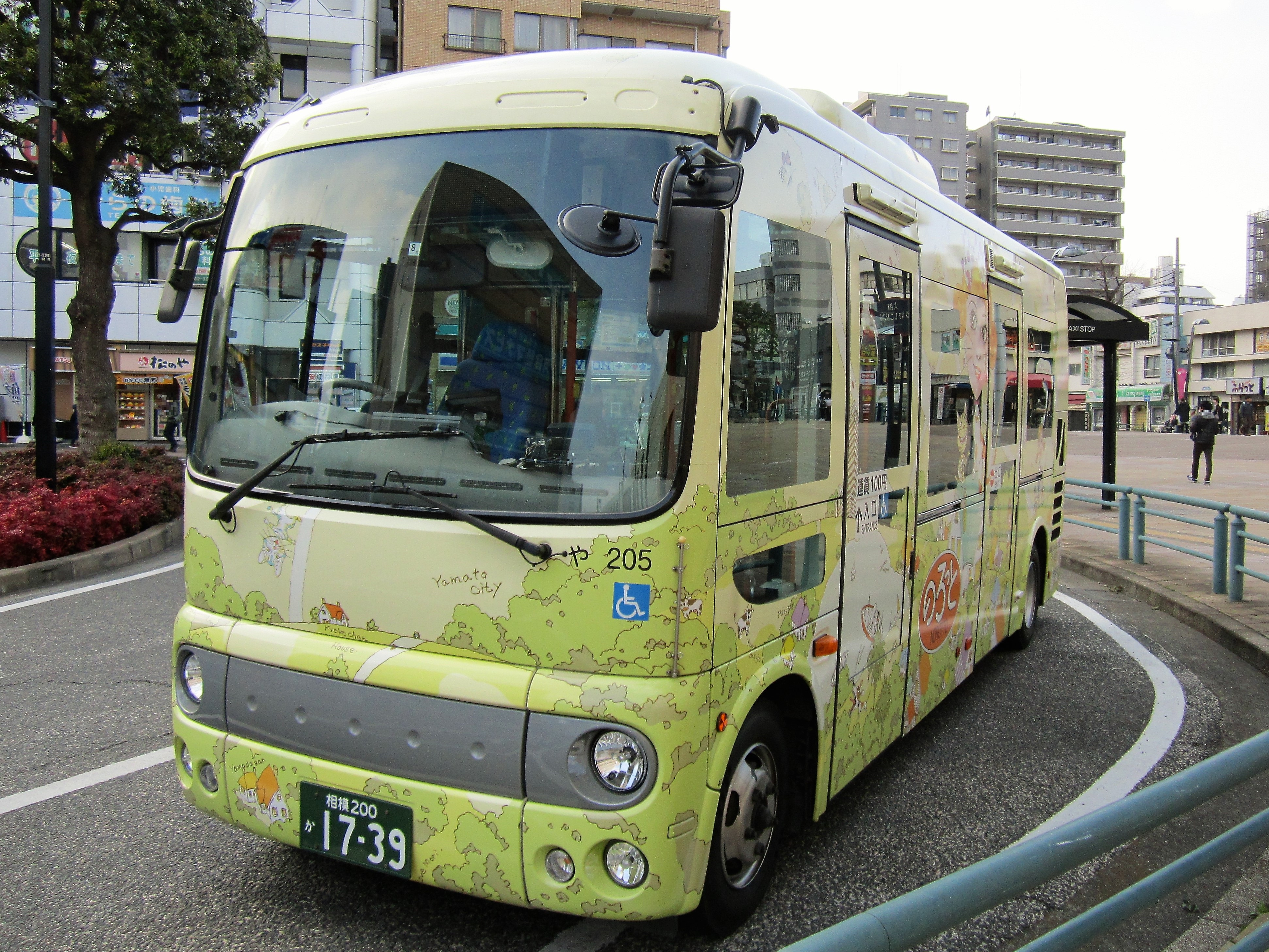 大和市コミュニティバス「のろっと」（神奈川中央交通 や205） Canon PowerShot A2200